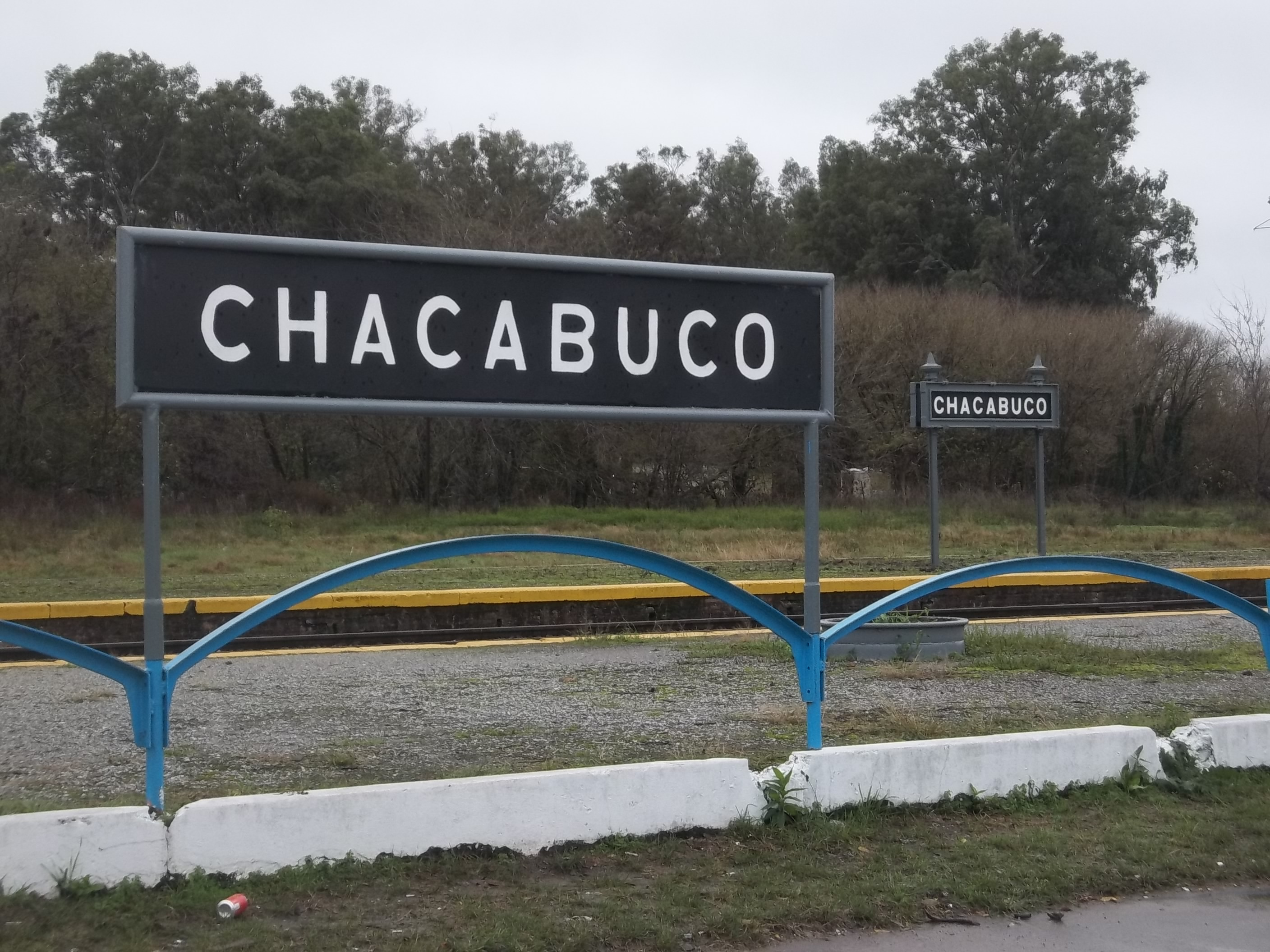 Tanque ubicado en la estación Chacabuco, ciudad de Chacabuco, cabecera del partido homónimo, Provincia de Buenos Aires, República Argentina